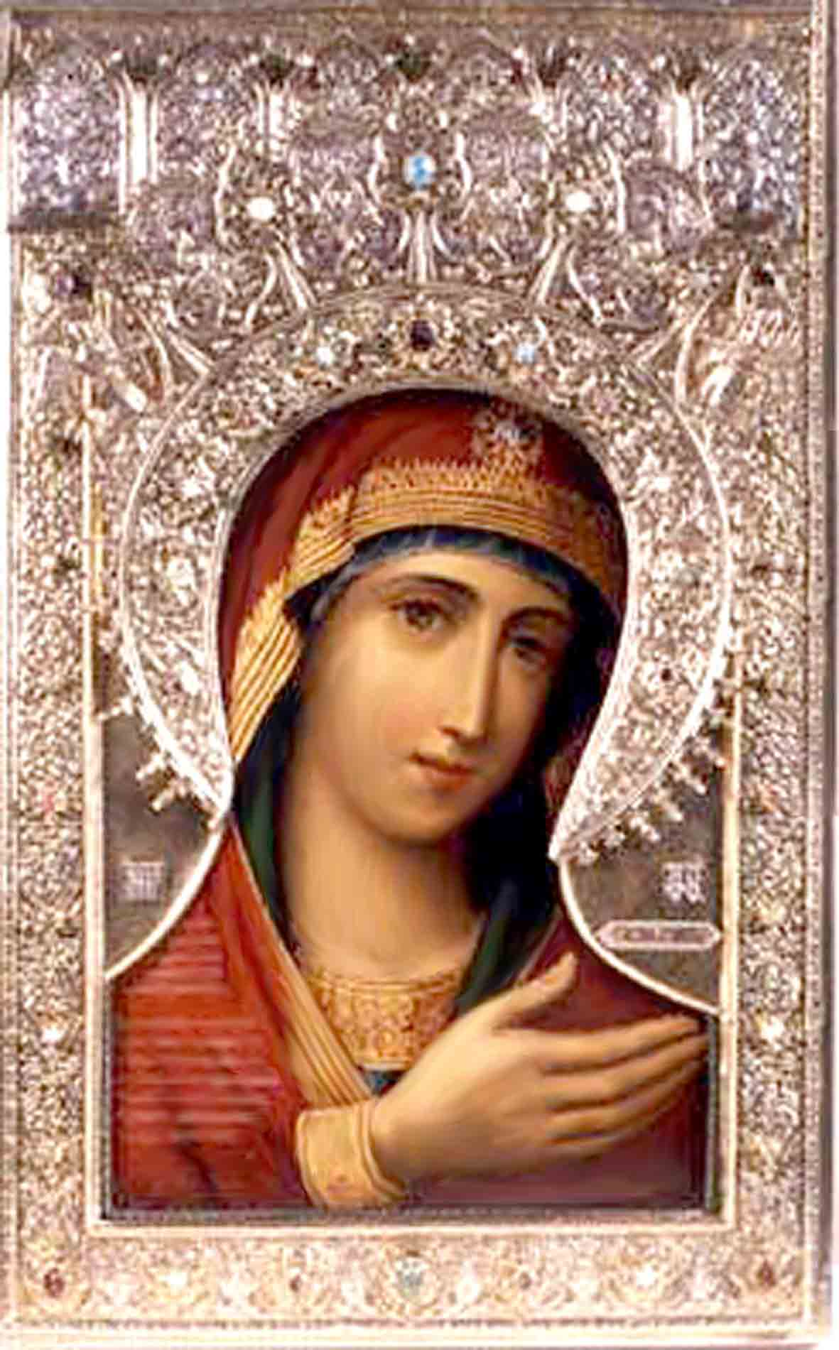 Икона Божией Матери Невская Скоропослушница